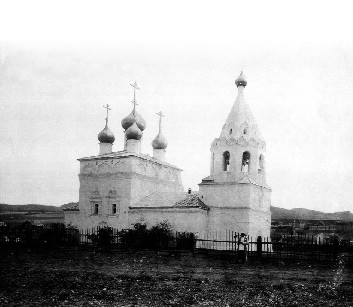 Собор Успенского Нерчинского монастыря (1706-1712)Первая каменная церковь, построенная к востоку от Байкала.The first stone building constructed by the Russians east of Lake Baikal.